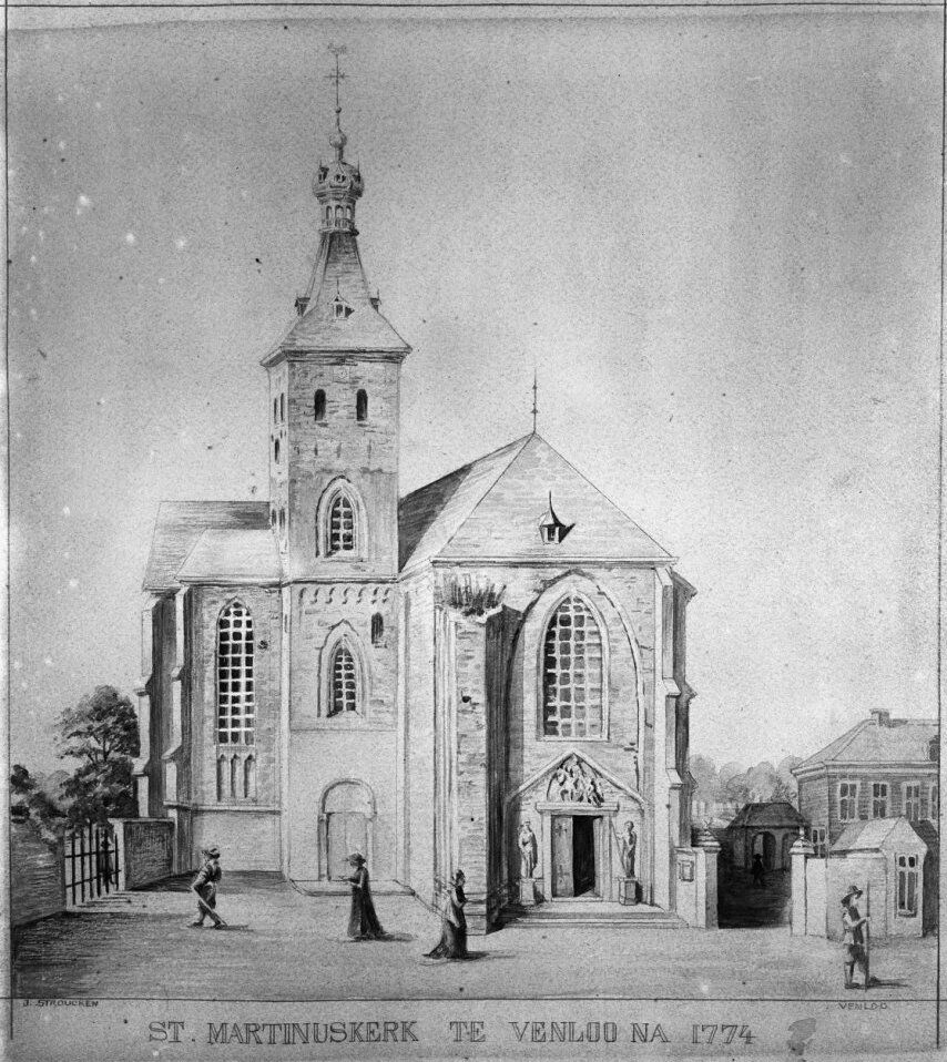 Sint Martinus Of Rooms-Katholieke Kerk: kerk, naar tekening in het bezit van de heer Bloemen